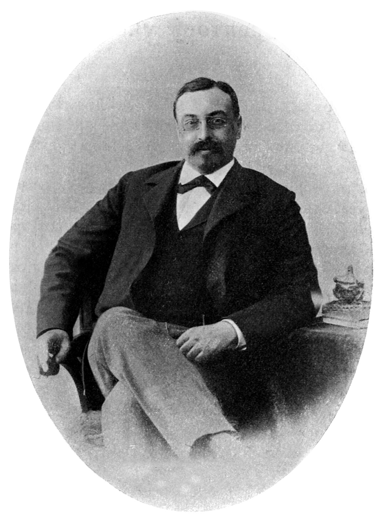 Портрет И. И. Толстого, министра народного просвещения Российской империи в 1905—1906 гг.